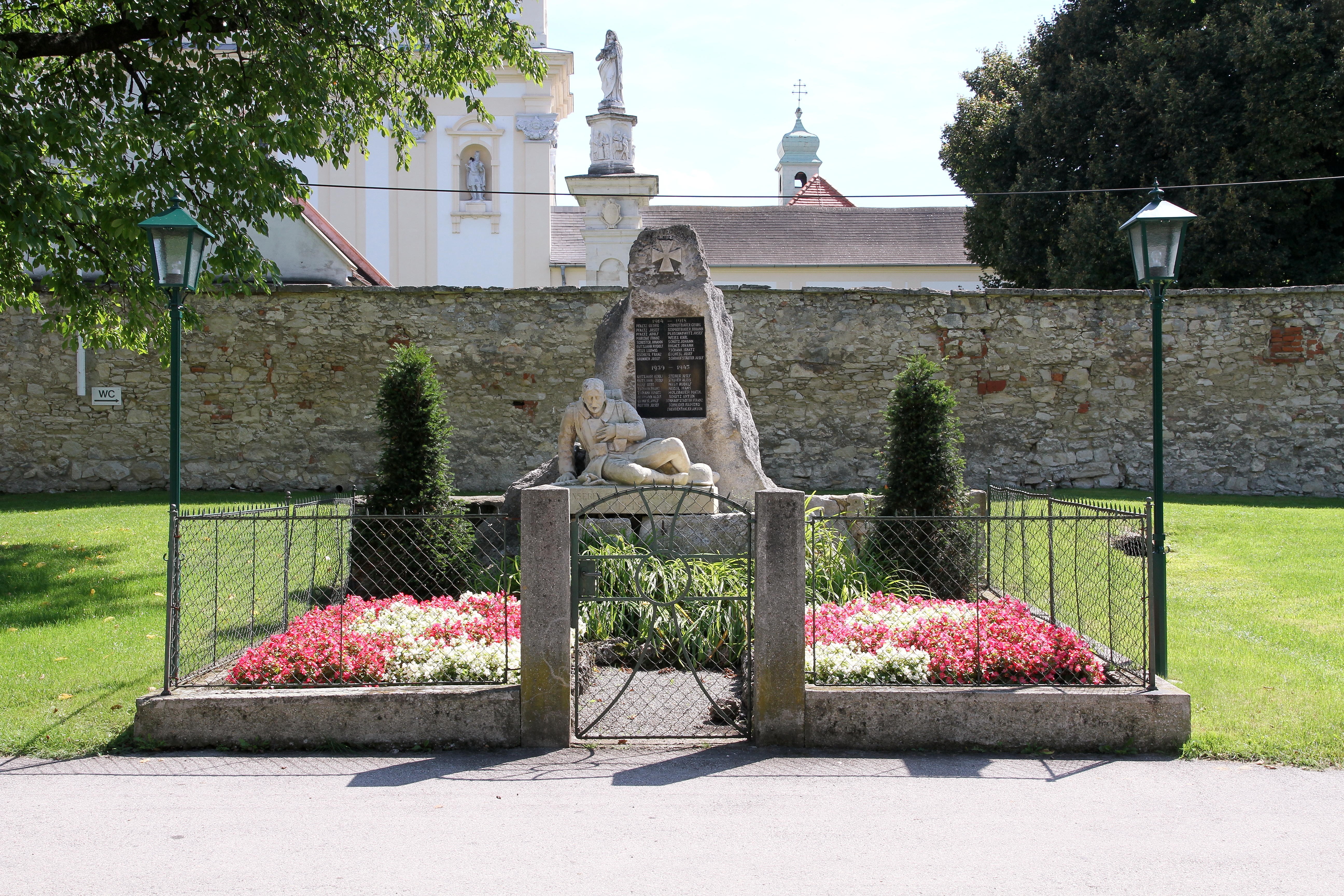 Das Soldatendenkmal in der burgenländischen Marktgemeinde Loretto.